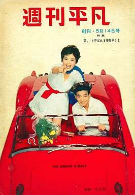 『週刊平凡』、1巻1号、平凡出版、1959年5月14日